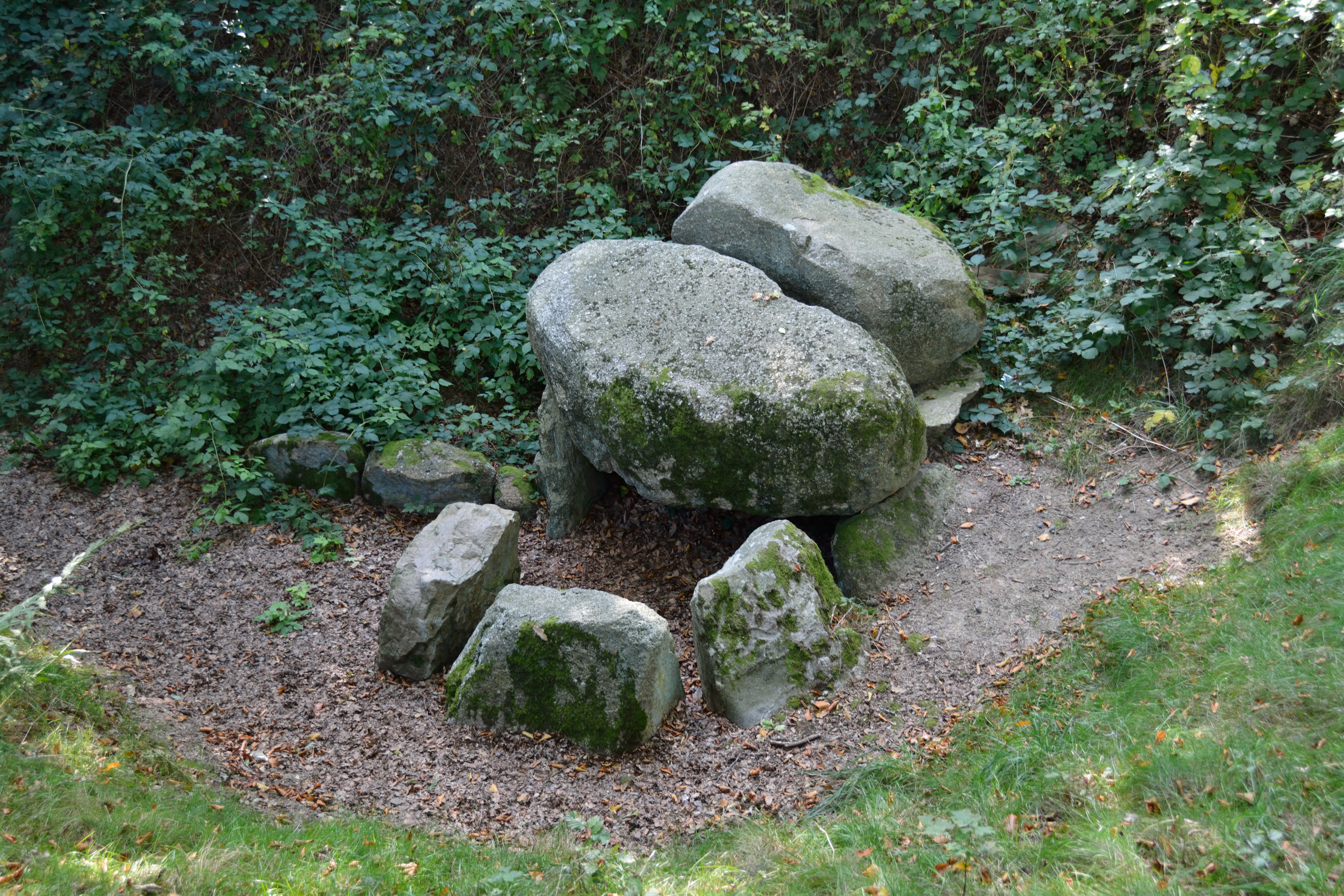 Das Hügelgräberfeld "Hademarscher Berge" liegt in Hanerau-Hademarschen direkt an den Sportplätzen. Von den ehemals bekannten 30 Grabhügeln sind heute noch fünf erkennbar. Ein Hügel wurde bisher geöffnet, das Grab ist der Öffentlichkeit zugänglich. Zwischen zwei Hügeln wurde während der Nazi-Diktatur in Deutschland ein Flakturm errichtet, er dient heute als Ausgangspunkt für einen Klettergarten im Wald